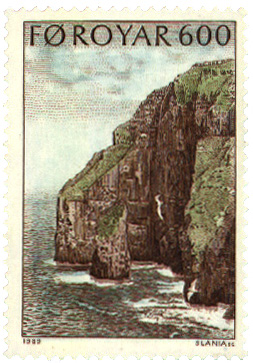 Asmundarstakkur sea stack, Suduroy, Faroes